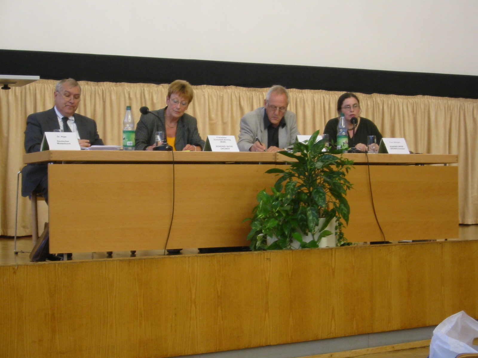 Podium Bürger Dresdens gegen WOBA Verkauf, von links nach rechts: Direktor des deutschen Mieterbundes Dr. Franz-Georg Rips, MdB Franziska Eichstaedt-Bohlig (Bündnis 90/Die Grünen), Architekt Andreas Friedrich (Podiumsführer), Eva Jähnigen (Bündnis 90/Die Grünen Dresden)